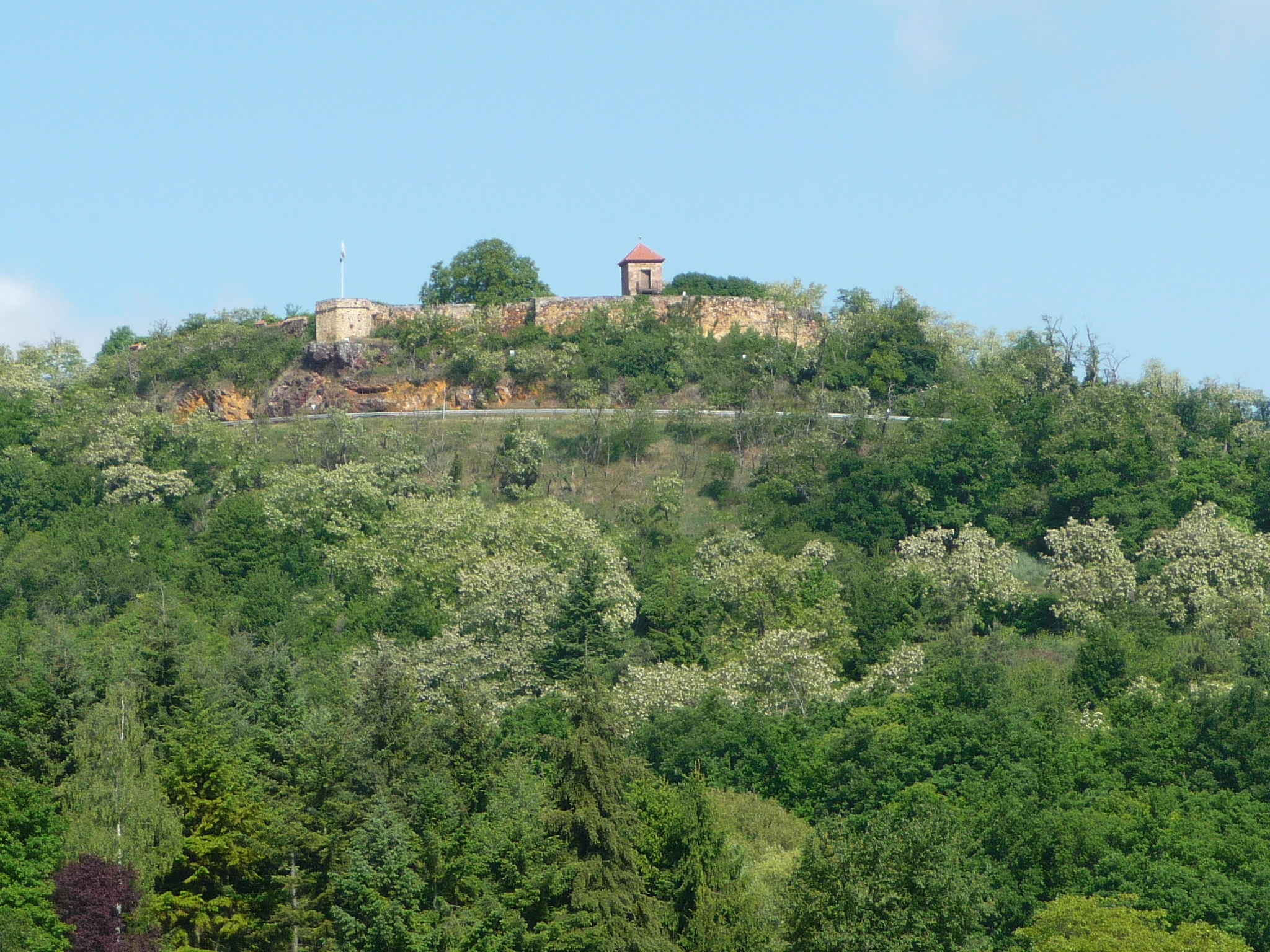 Die Burg Battenberg ist eine Burgruine auf der Gemarkung der Gemeinde Battenberg (Pfalz) im Landkreis Bad Dürkheim in Rheinland-Pfalz.